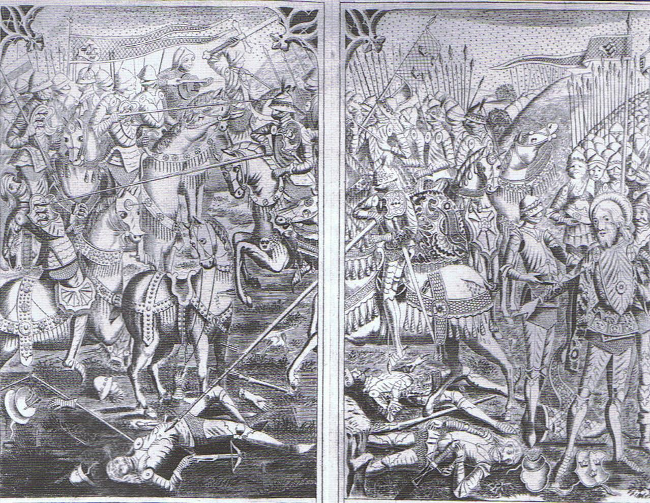 Сражение при Брункеберге